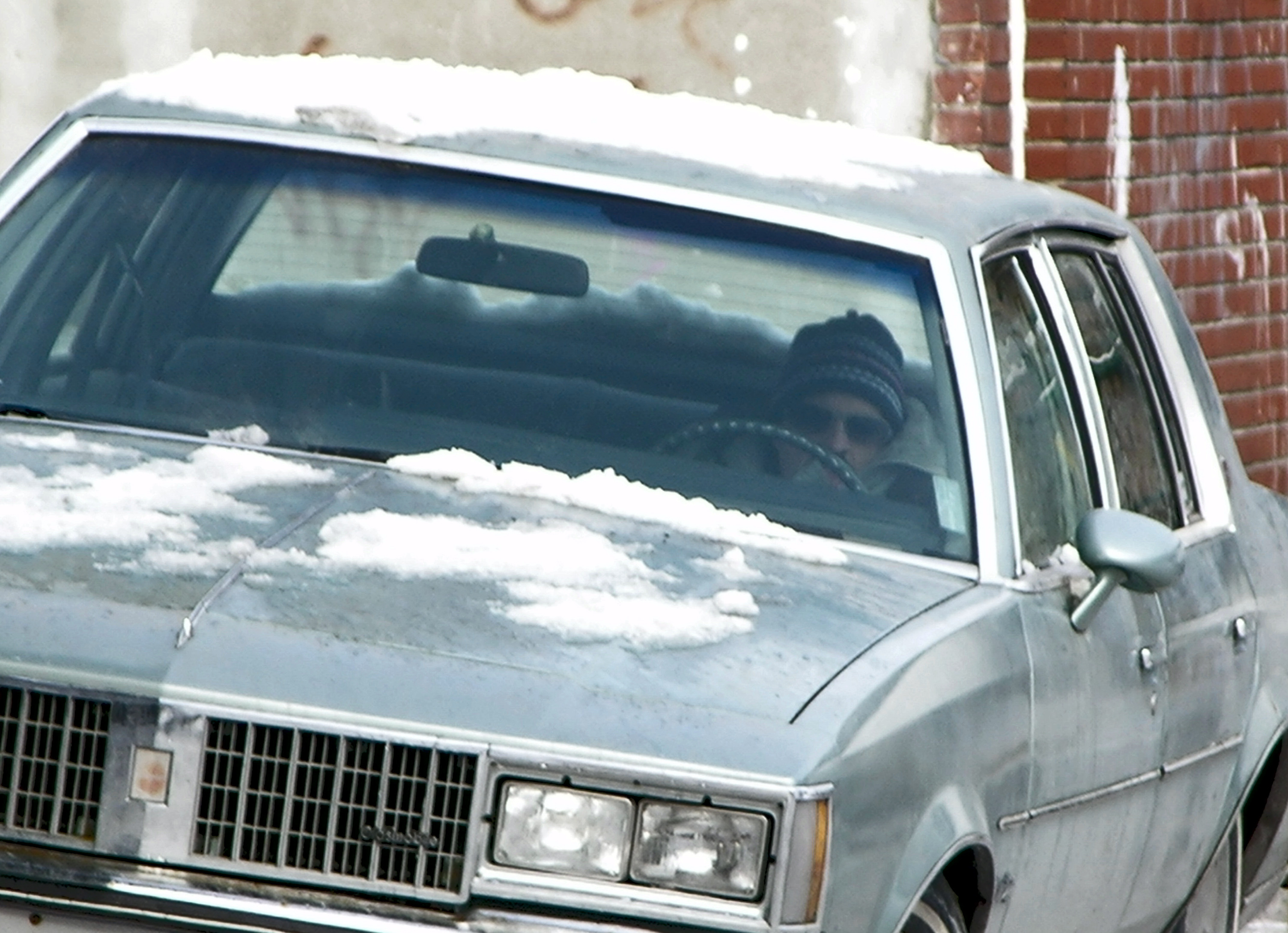 Scène du film "Sur la trace d'Igor Rizzi", Laurent Lucas à bord d'une Oldsmobile 1981.